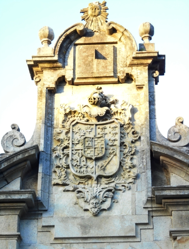 Escudo de Armas del Palacio de Mugártegui en Pontevedra capital